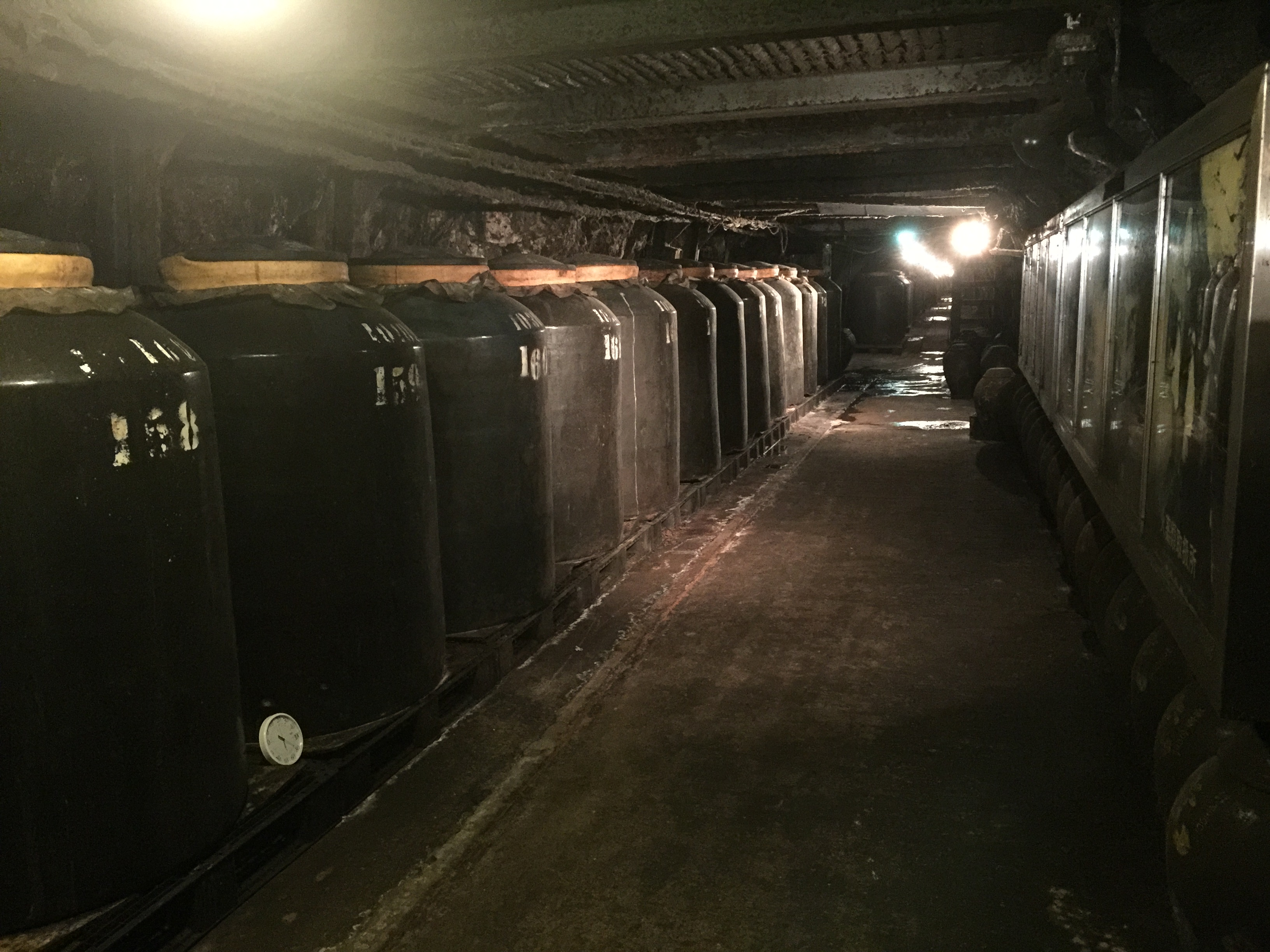 薩摩金山蔵で、旧串木野金山坑道で熟成される芋焼酎